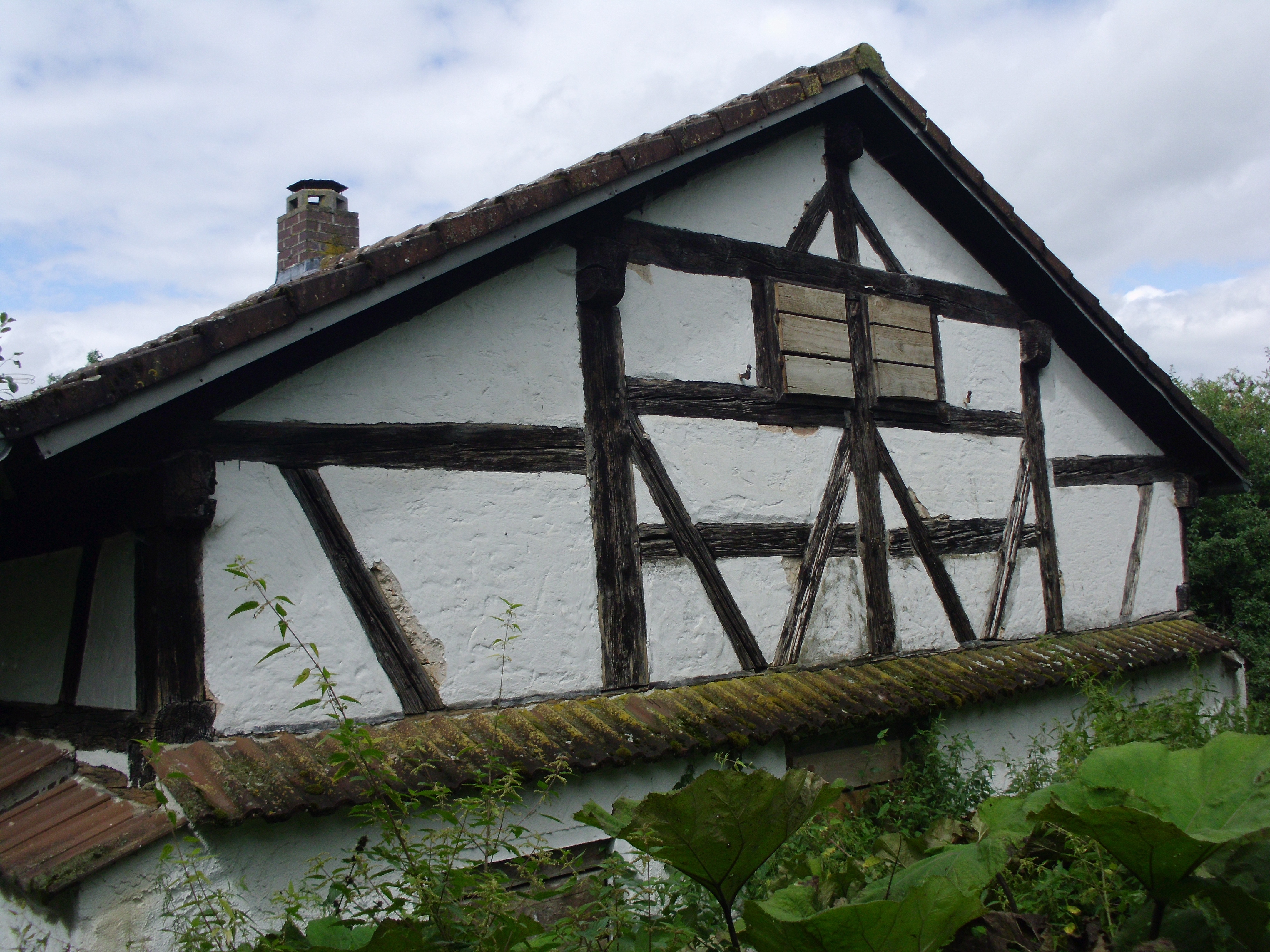 Rutzenhof, Ortsteil von Treuchtlingen im Landkreis Weißenburg-Gunzenhausen, Lutherhaus